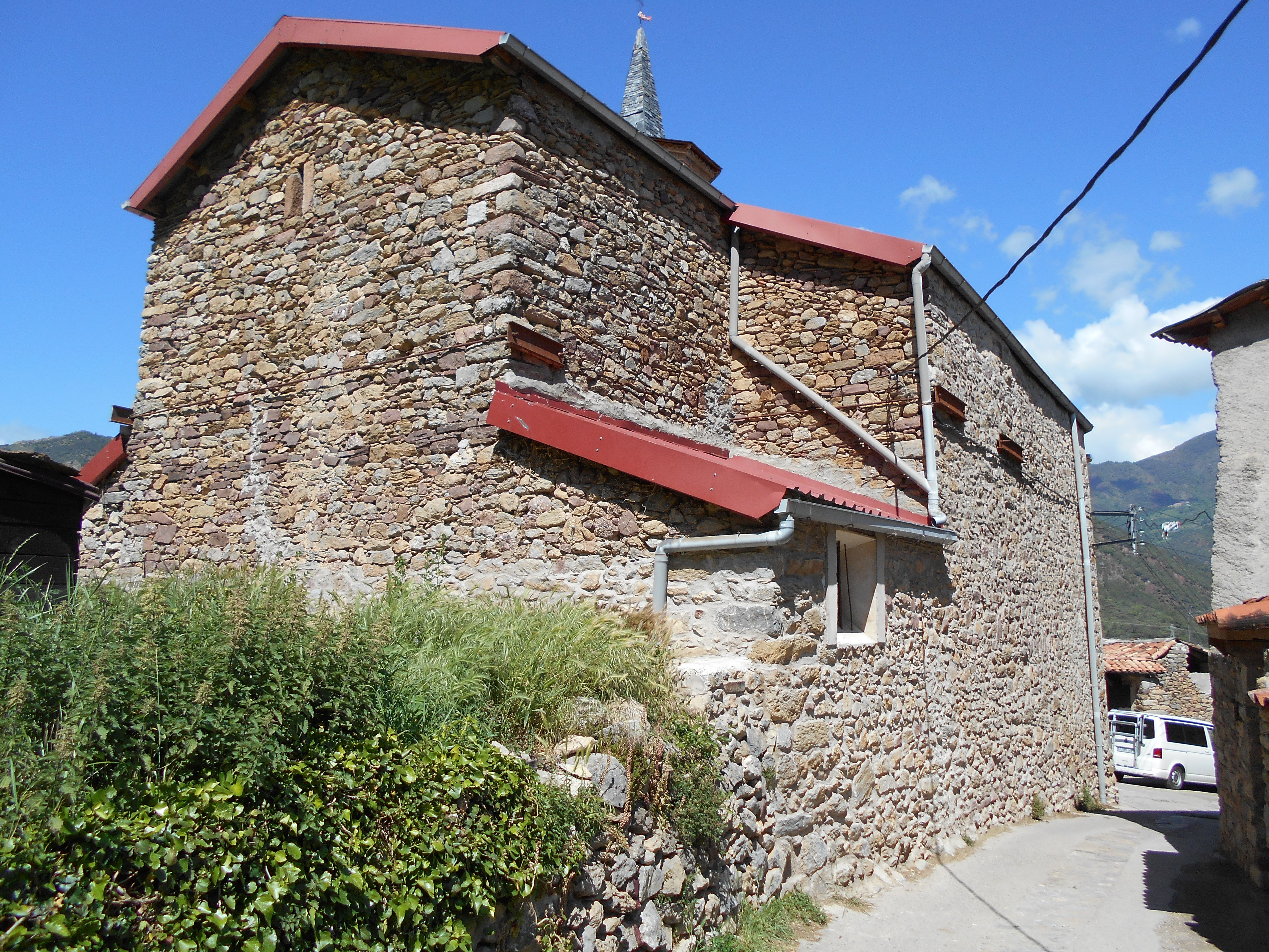 Capçalera de l'església de Sant Lliser